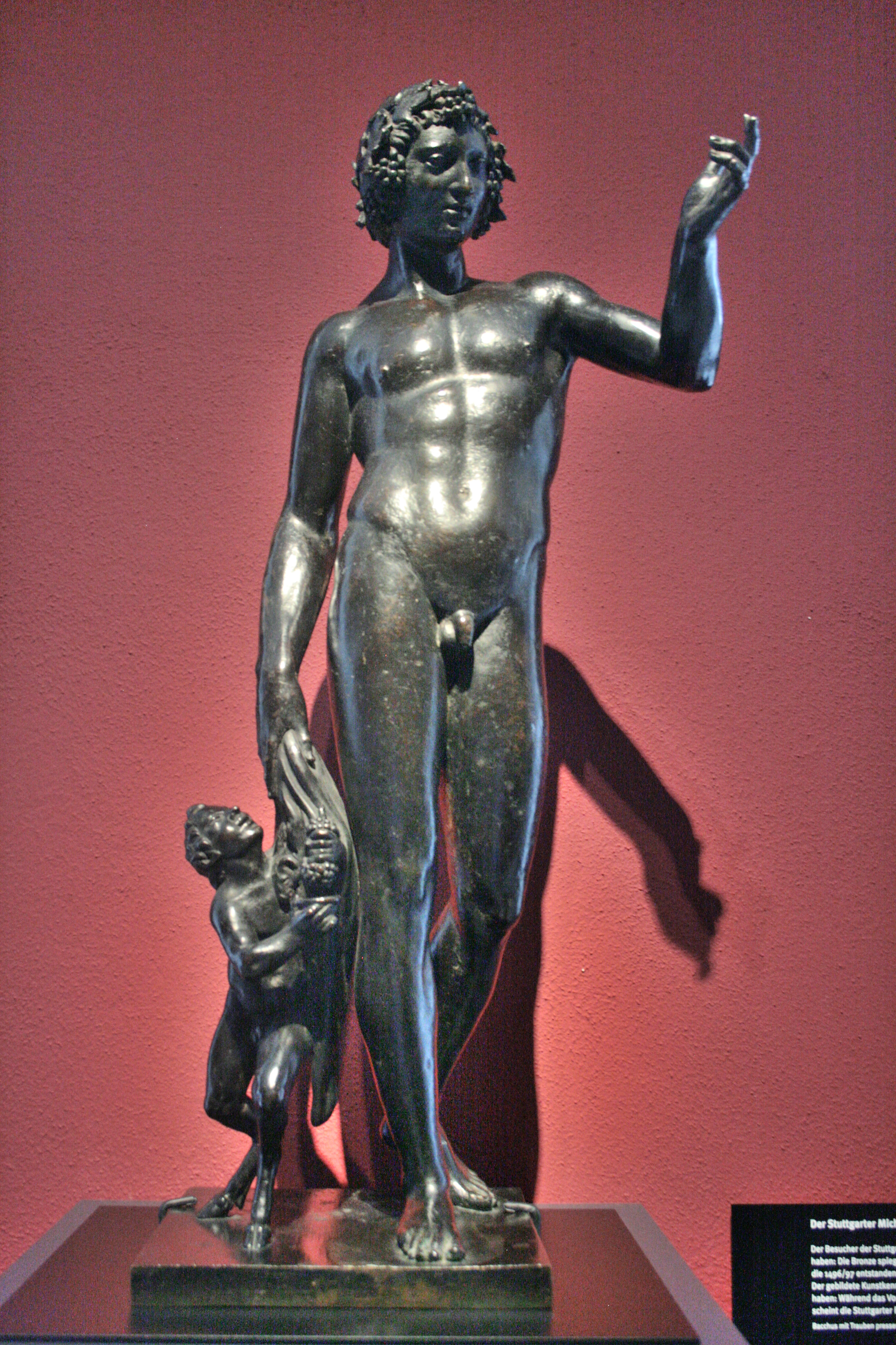 Bacchus mit Trauben, Florenz, Mitte 16.Jahnhundert.